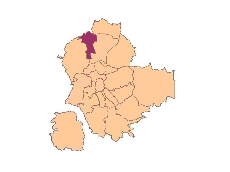 plan de saint-etienne quartier de Bergson La Terrasse